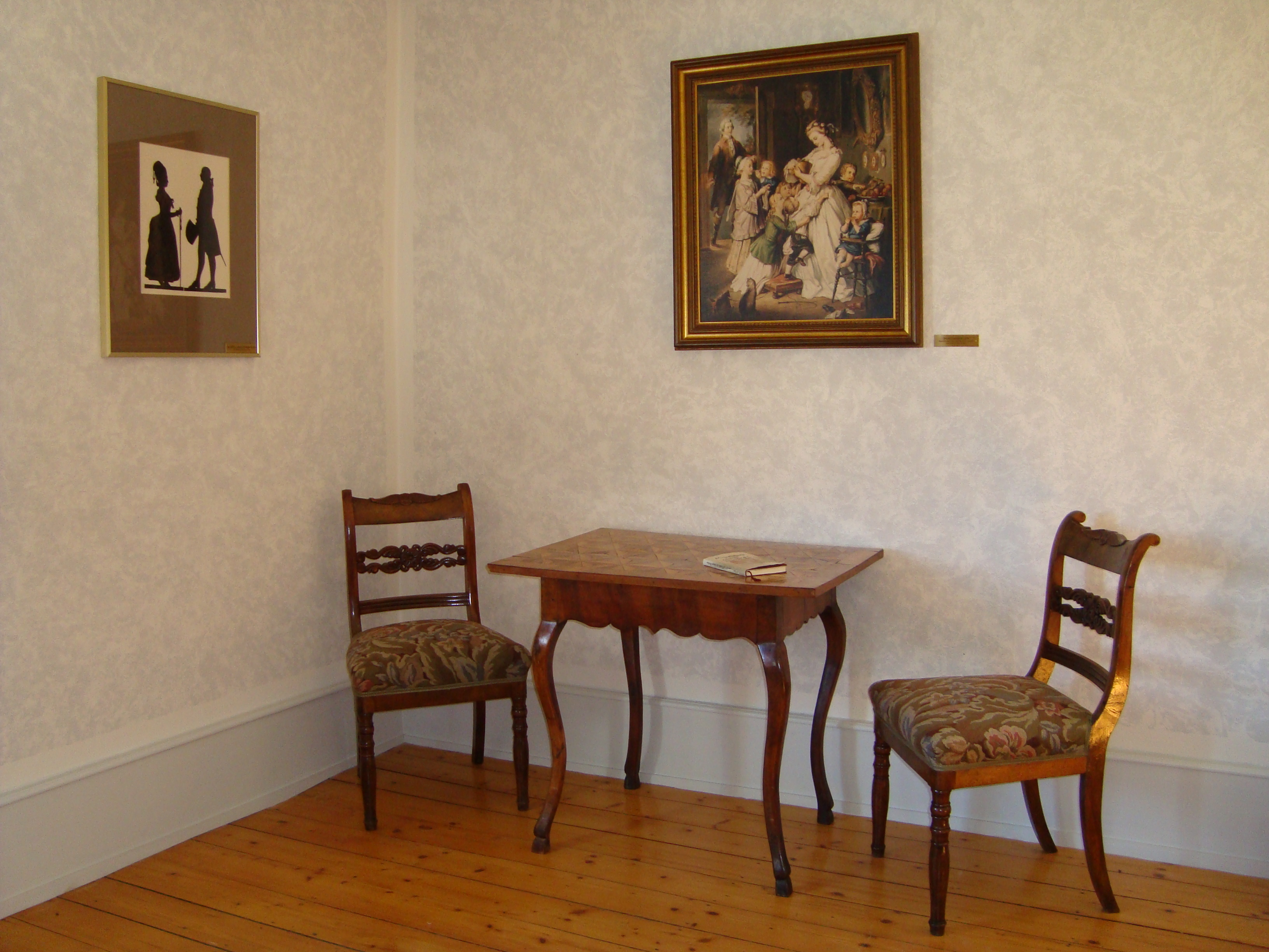 Ballsaal im Goethehaus Hüttenberg-Volpertshausen